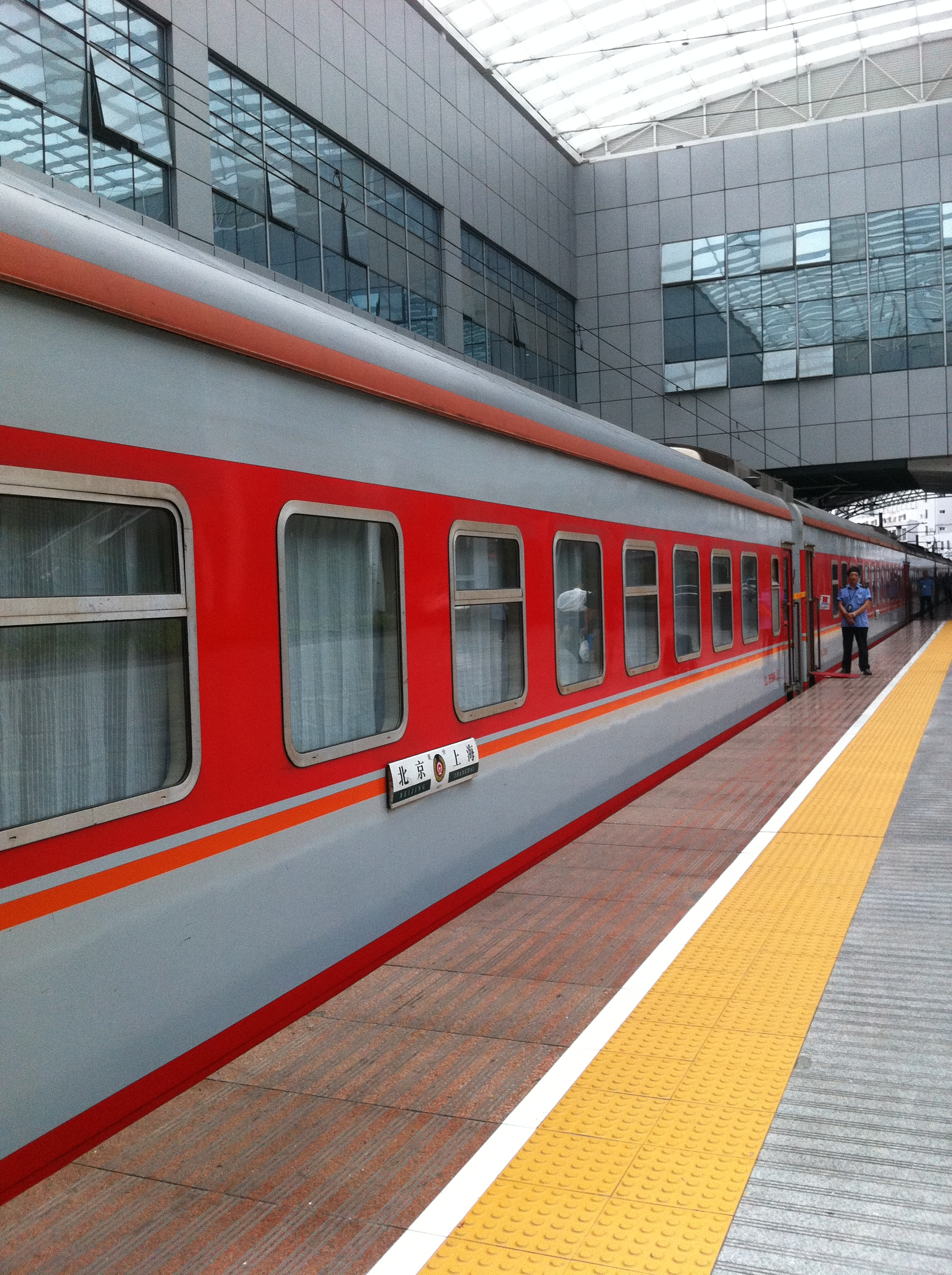 1462次列车在上海站